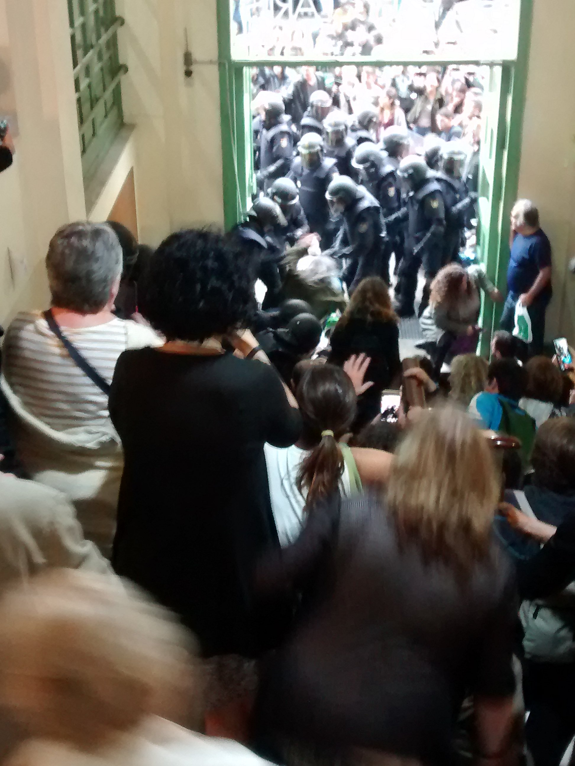 Intervenció policial a Institut Pau Claris de Barcelona l'1 d'octubre de 2017